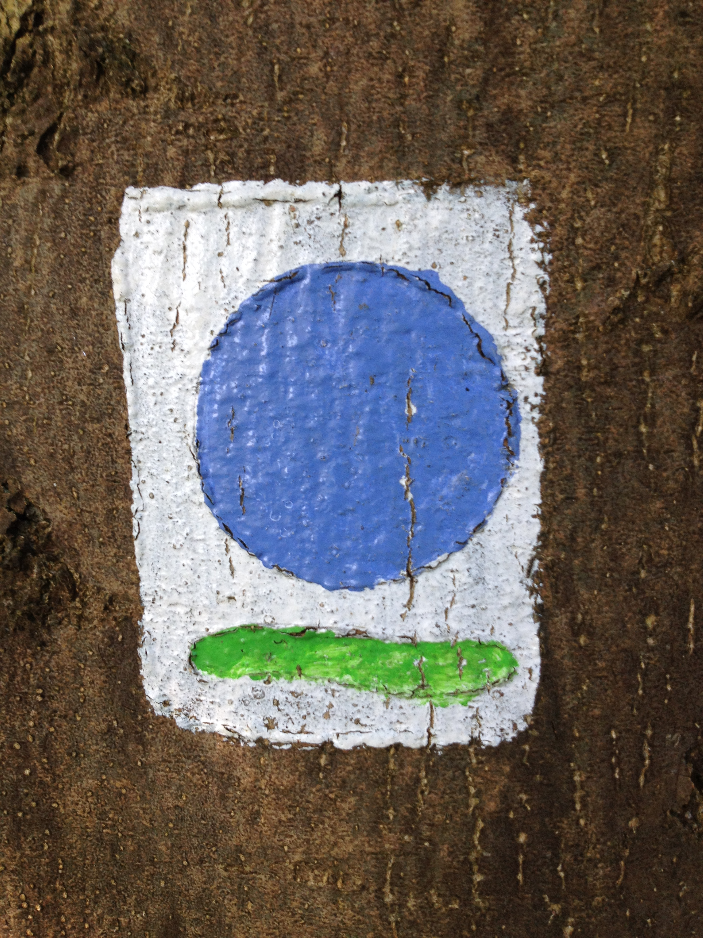 Wegzeichen des Hugenotten- und Waldenserpfades